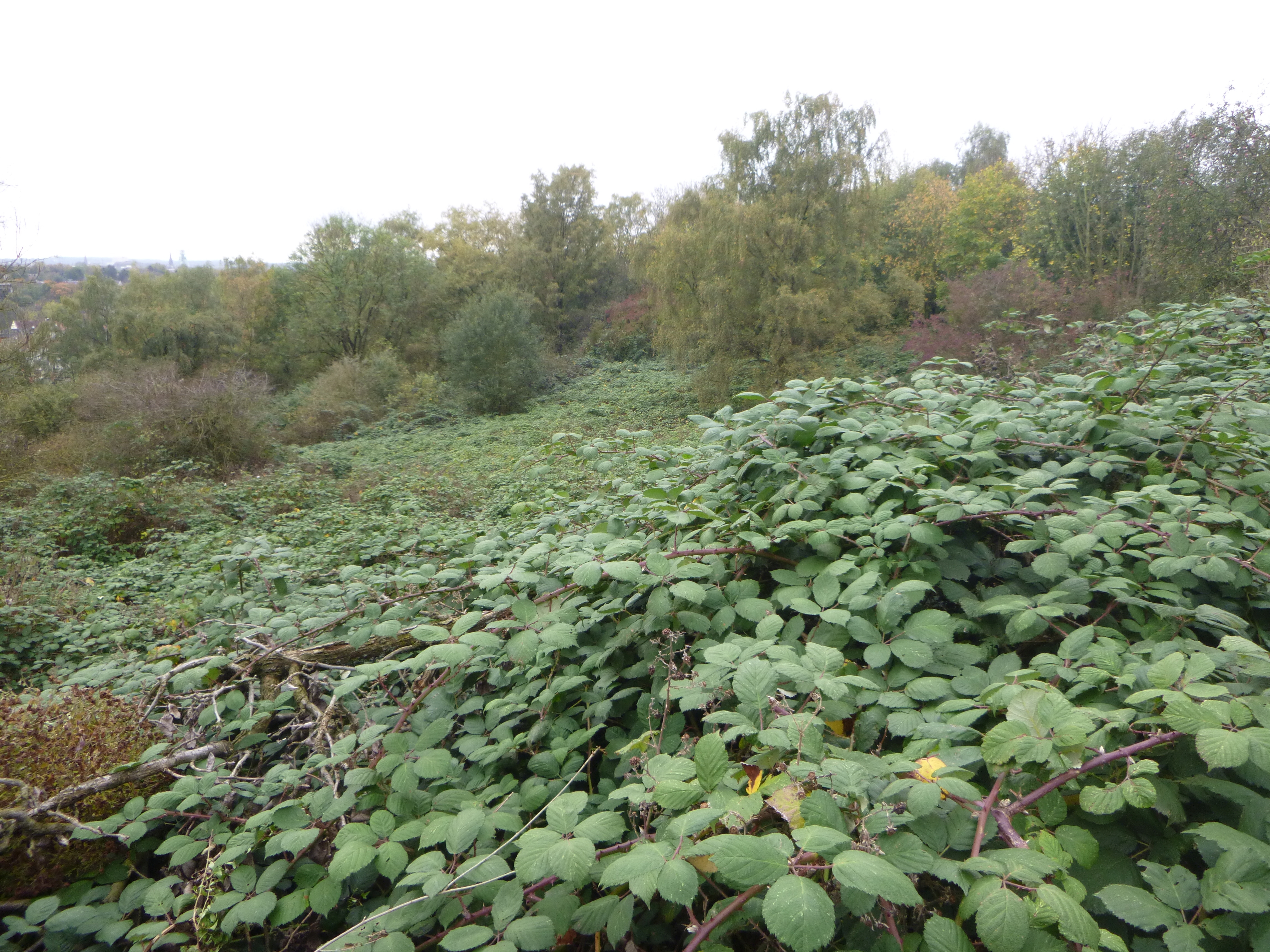 Rubus armeniacus Massenbestand im Ruhrgebiet (Nordrhein-Westfalen, Deutschland)